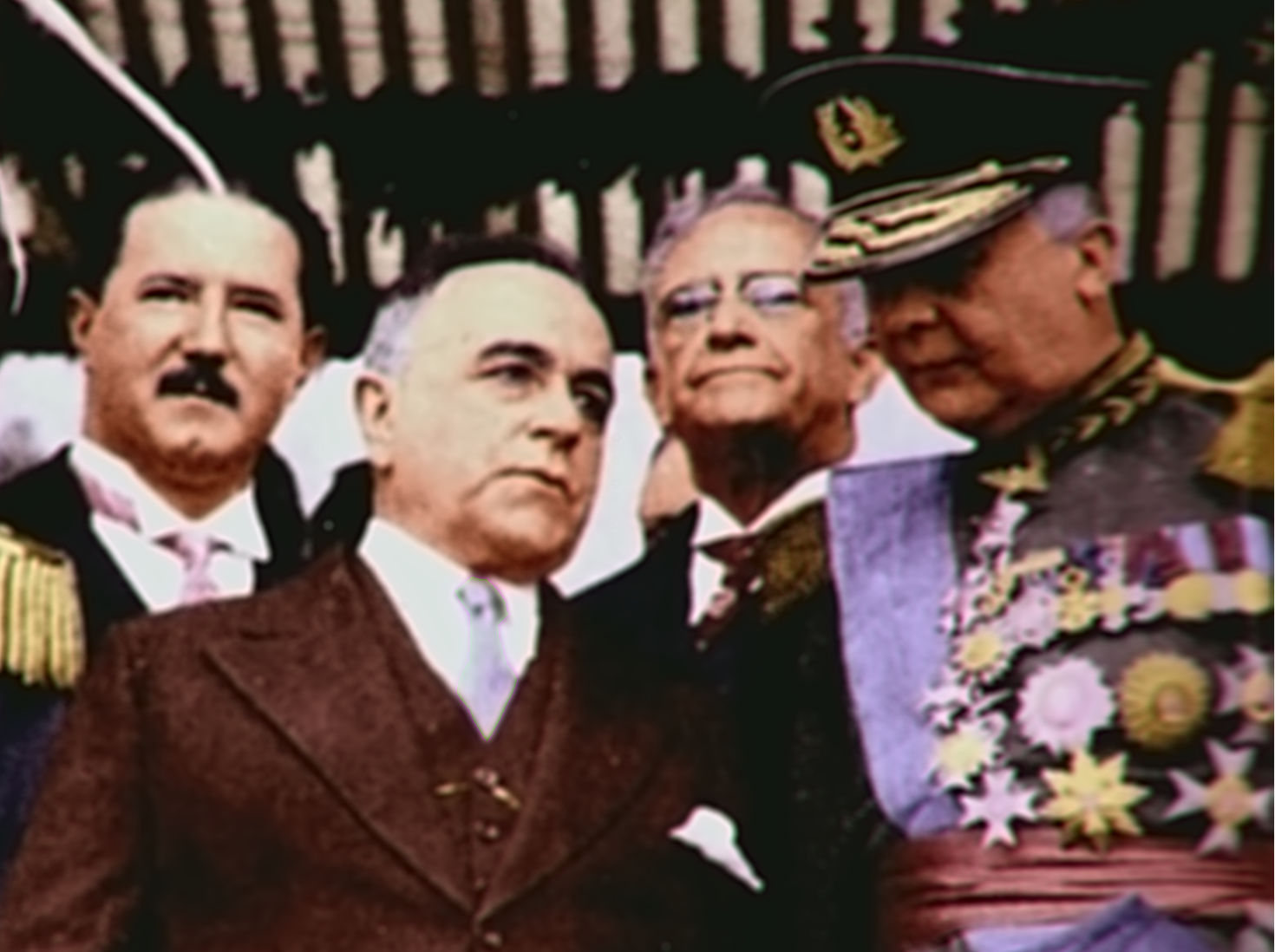 Fotografia do quinquagésimo aniversário da implantação do regime republicano no Brasil. No centro encontra-se o presidente Getúlio Vargas. Atrás, de bigode, Ademar de Barros.